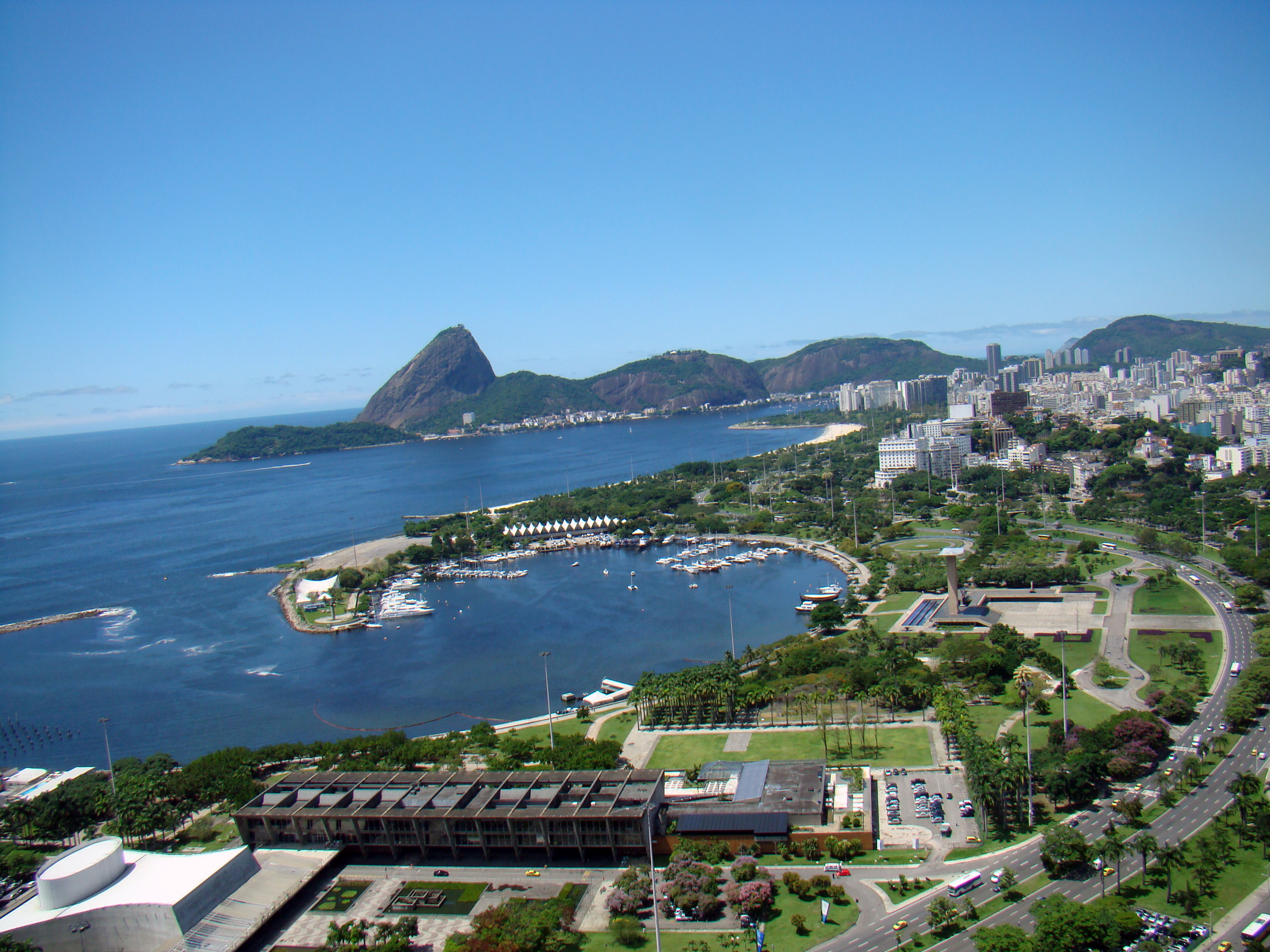 Foto tirada do Edif�cio Santos Dumont No Centro do Rio.